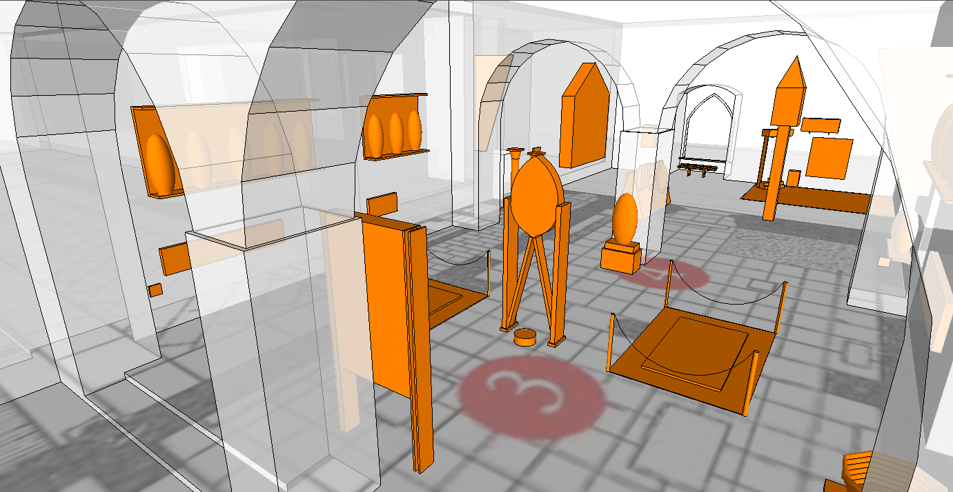 foto del modello sketch up sala 3 del castello sforzesco